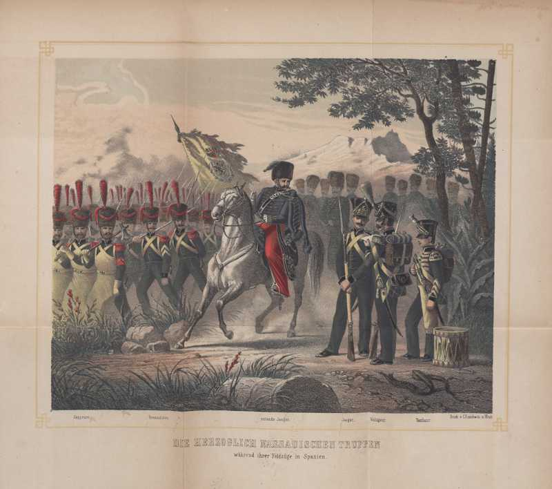 Darstellung von Truppen des Herzogtum Nassau in der Uniform während des Spanienfeldzugs um 1810.